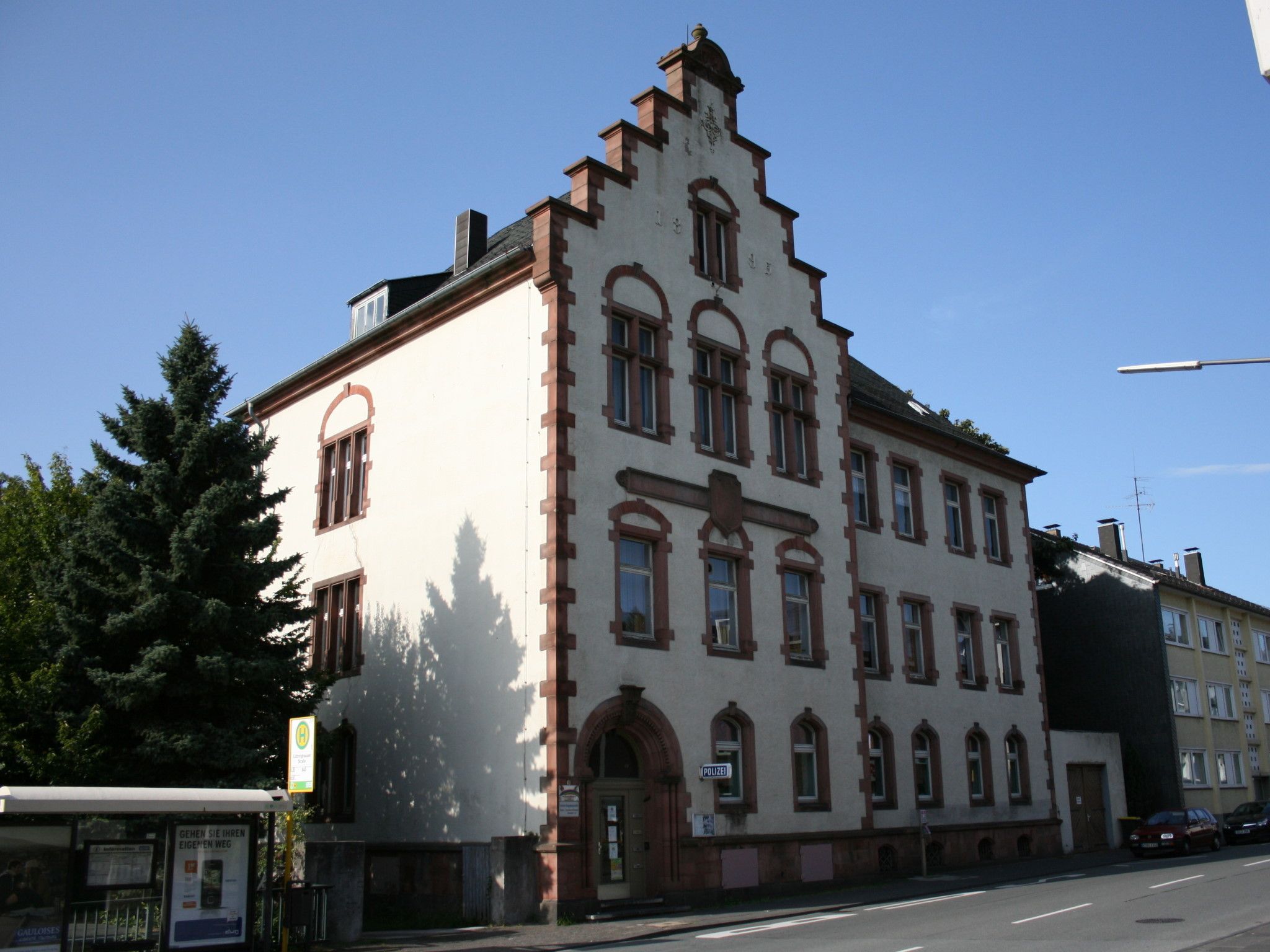 Wuppertal-Ronsdorf, Innenstadt